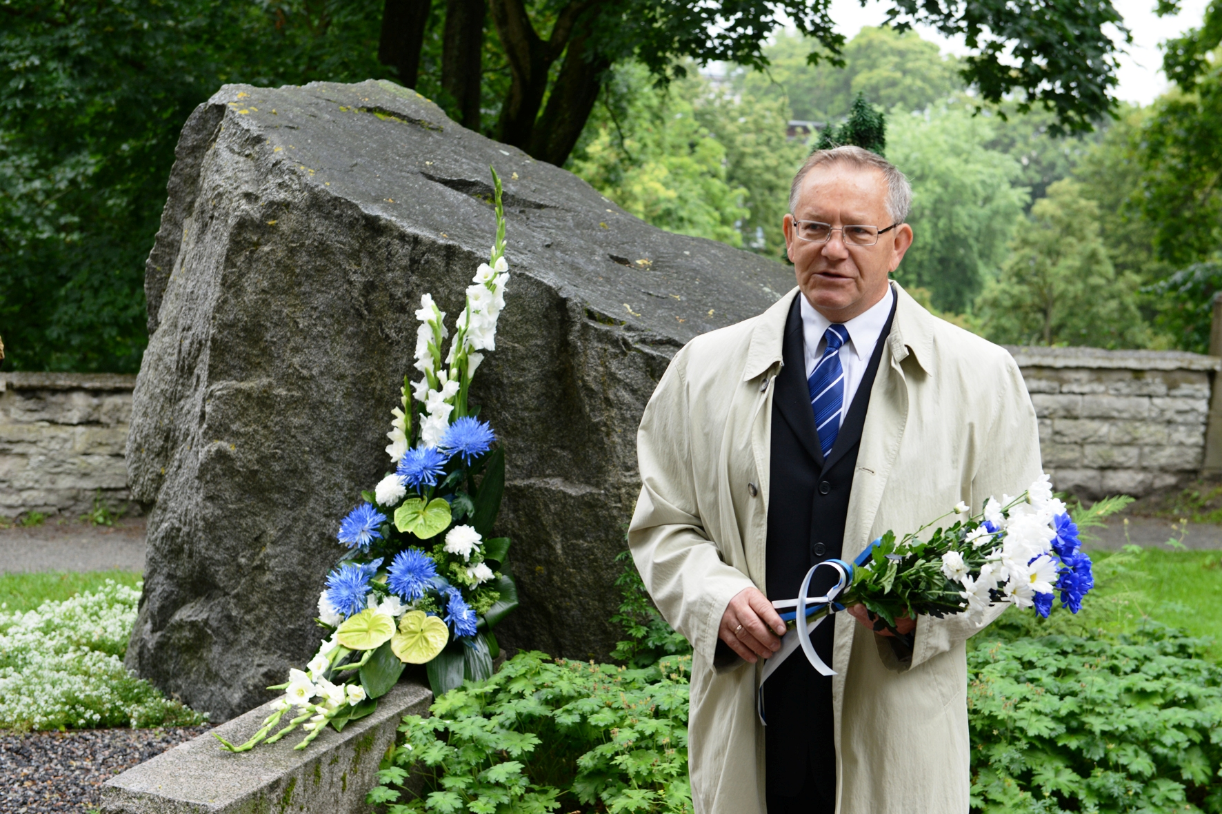 20. Augusti Klubi president Ants Veetõusme kõnelemas 20. augusti 1991 mälestuskivi juures Toompeal